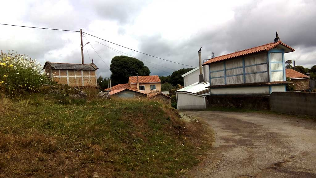 Vista da Carriceira, Curtis.